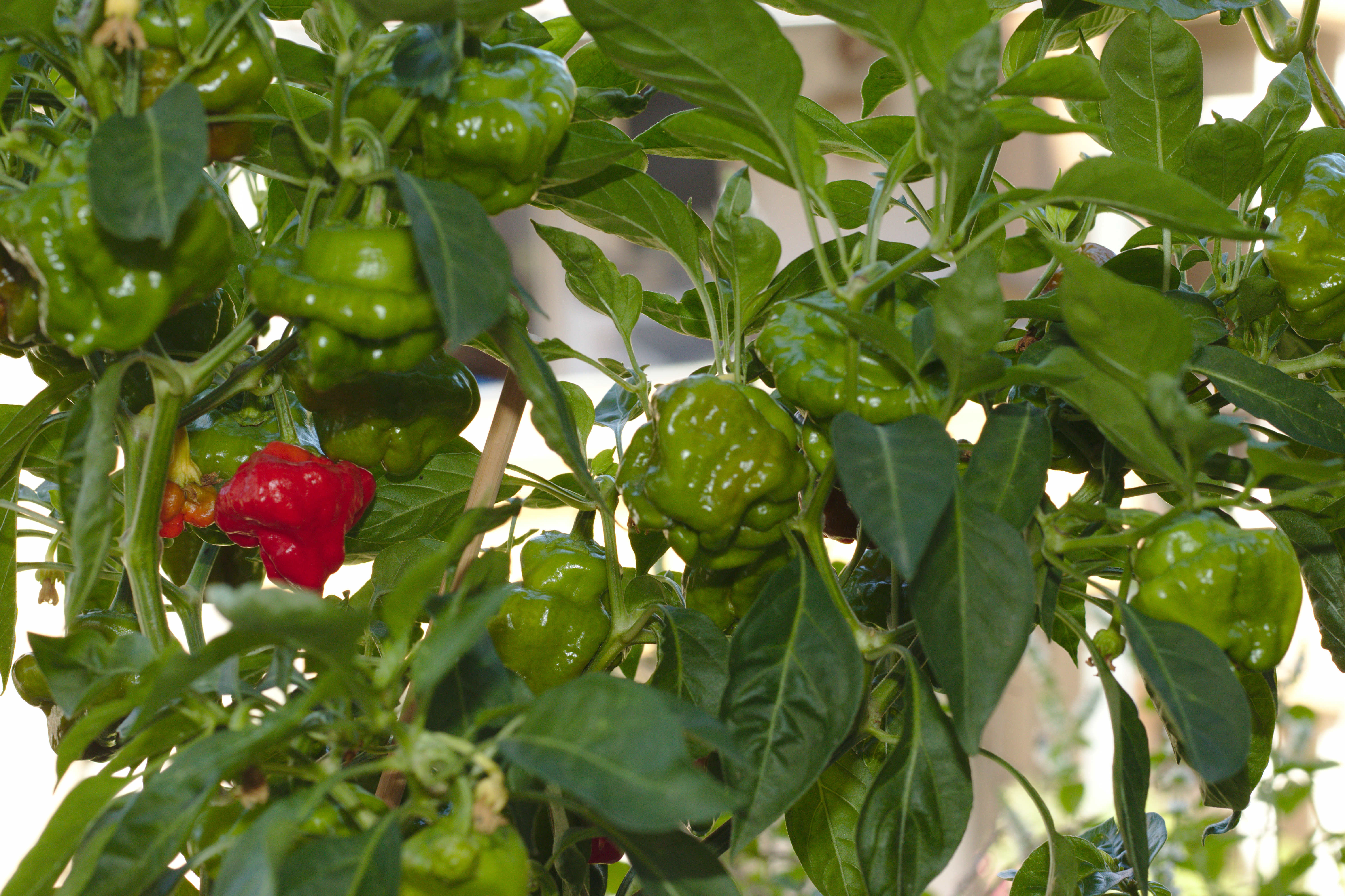 Scotch Bonnet (Capsicum chinense) Strauch mit reifen und unreifen Früchten.